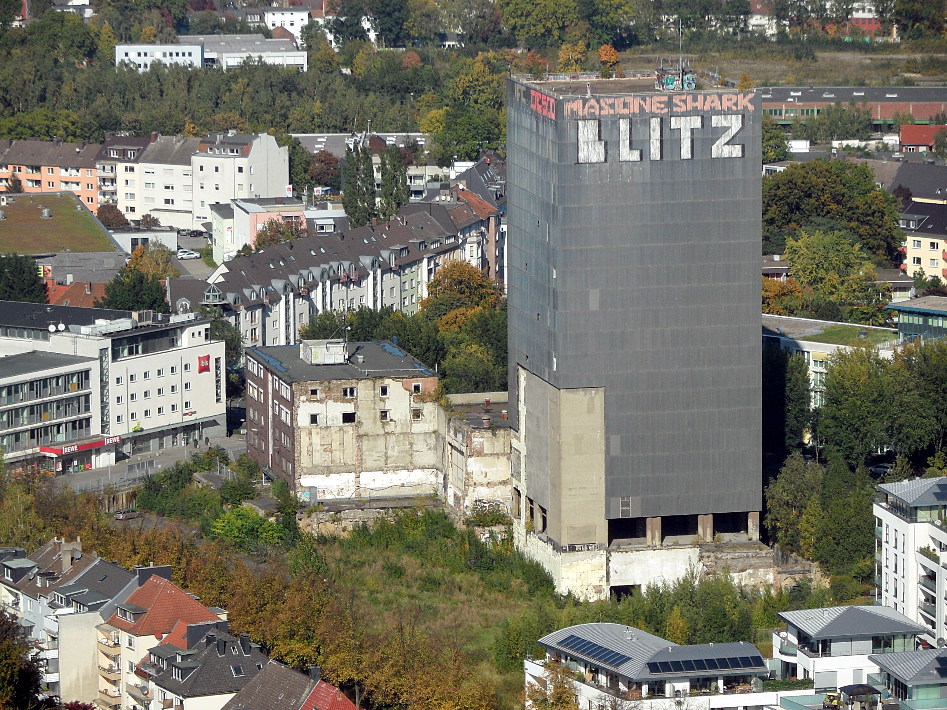 Gelände der ehemaligen Kronenbrauerei an der Märkischen Straße, Dortmund, mit markantem Turm; von Florianturm; Oktober 2015